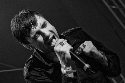 Musikeren Simon Kvamm under en Nephewkoncert på Popkommfestivalen, 8. oktober 2008.